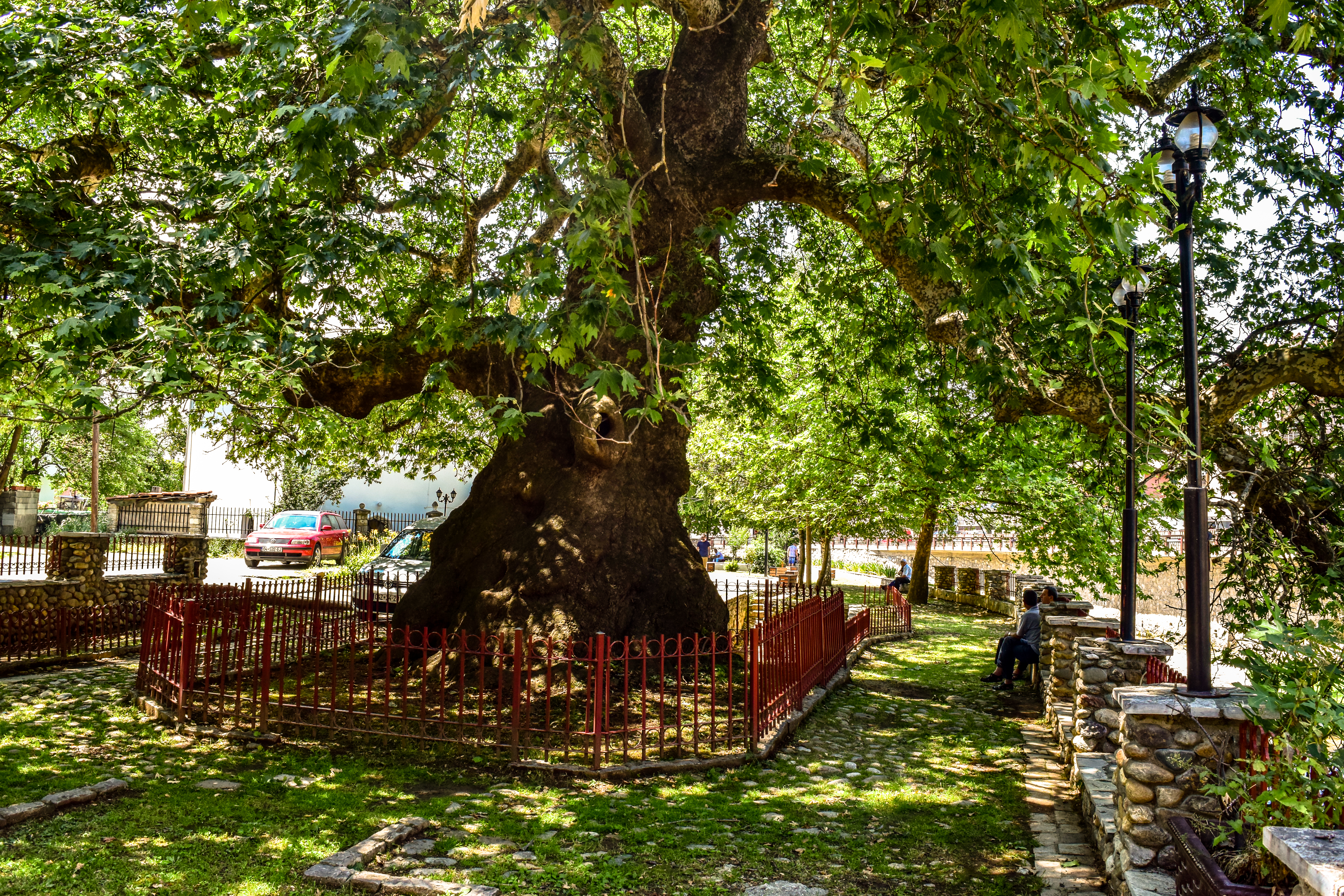 Rrapi (Platanus orientalis) në Marash, Prizren